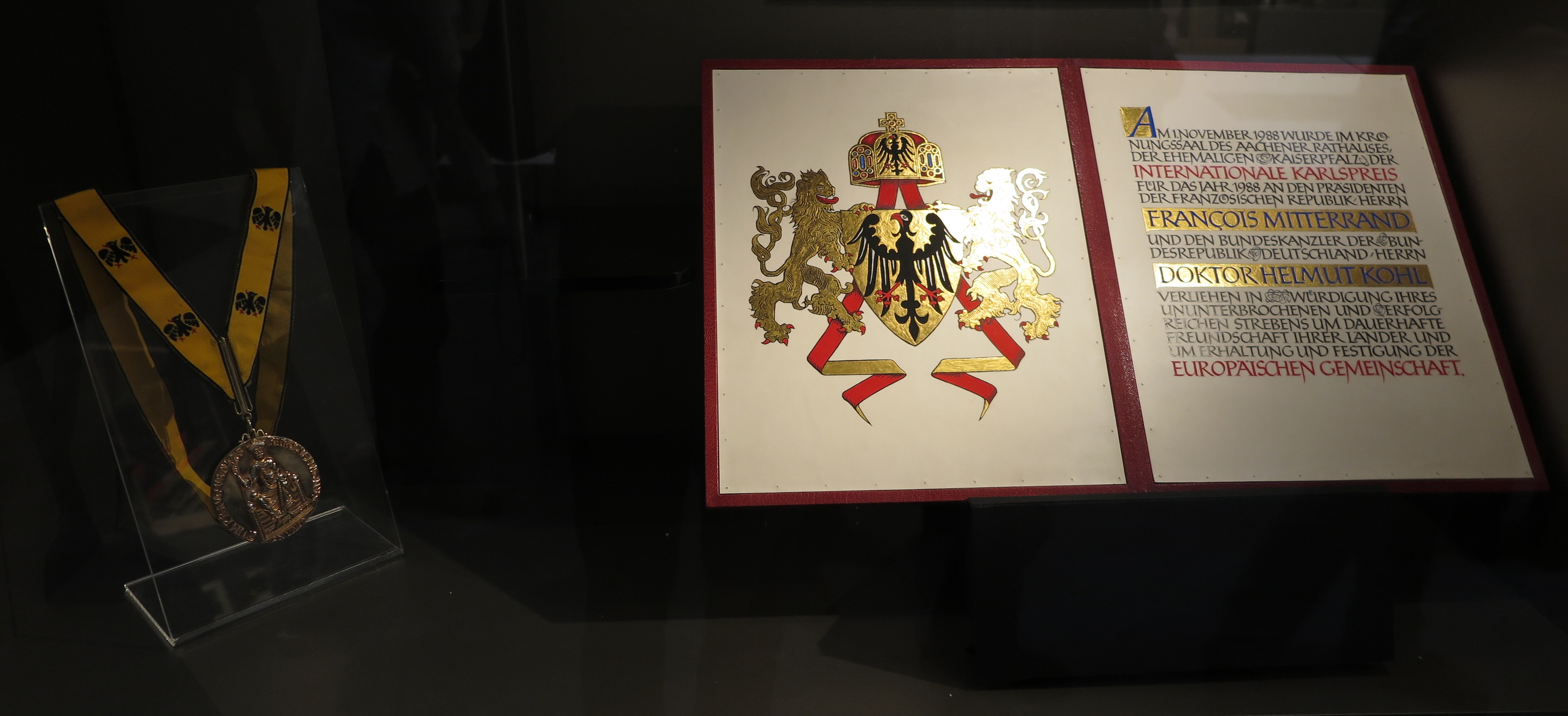 Medaille und Urkunde zum Karlspreis 1988 an François Mitterrand und Helmut Kohl im neuen Aachener Stadtmuseum „Centre Charlemagne”.